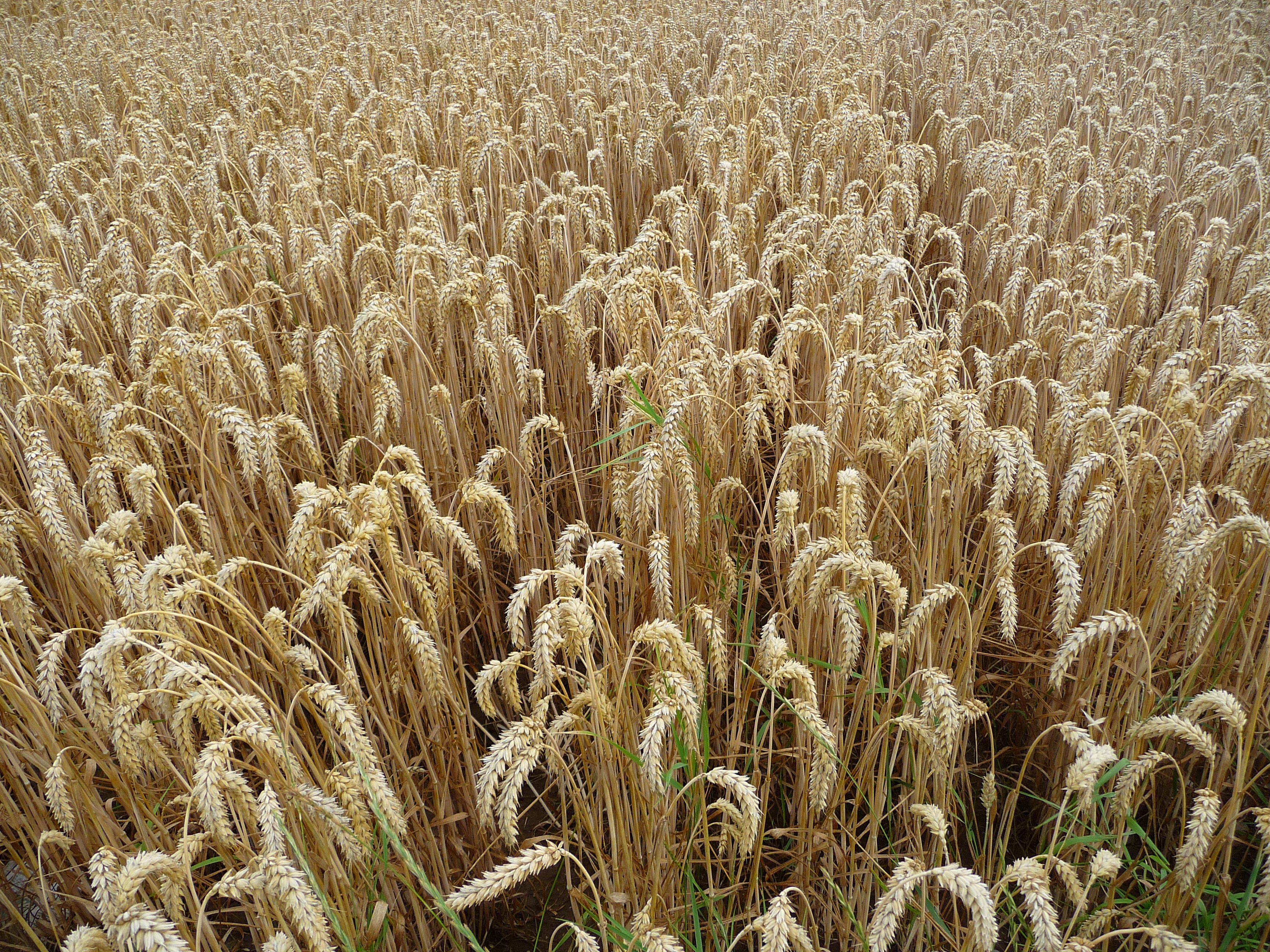 Weizenfeld (Triticum)